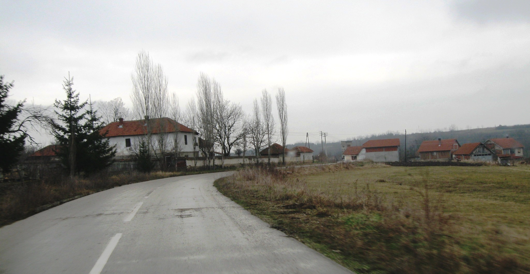 Mijajlica